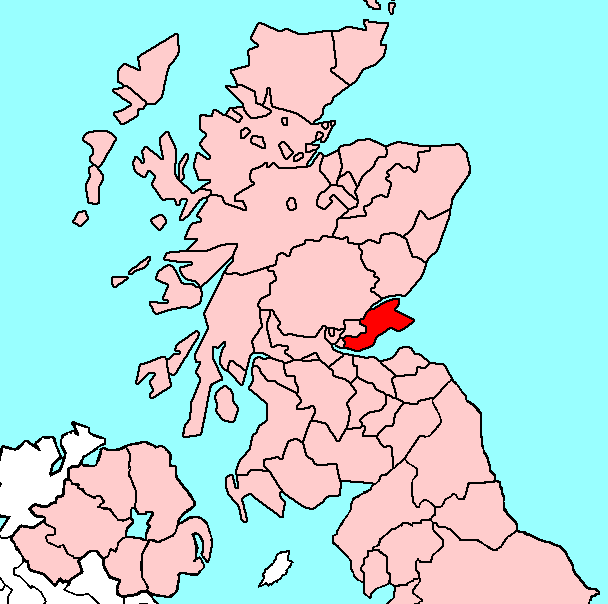 Fife